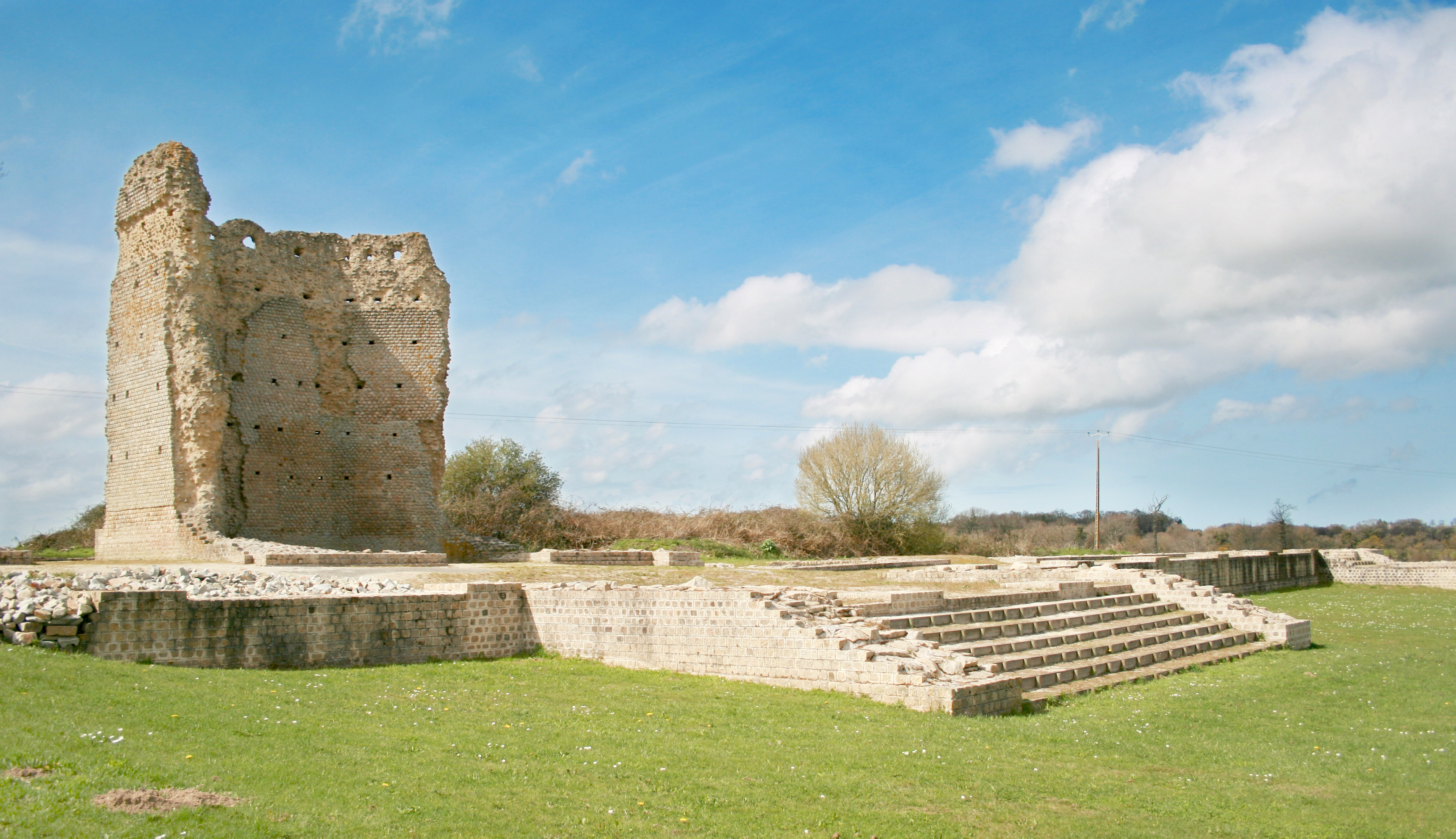 Sanctuaire des Coriosolites dit "temple de Mars" à Corseul. C'est le vestige gallo-romain le plus haut de Bretagne.